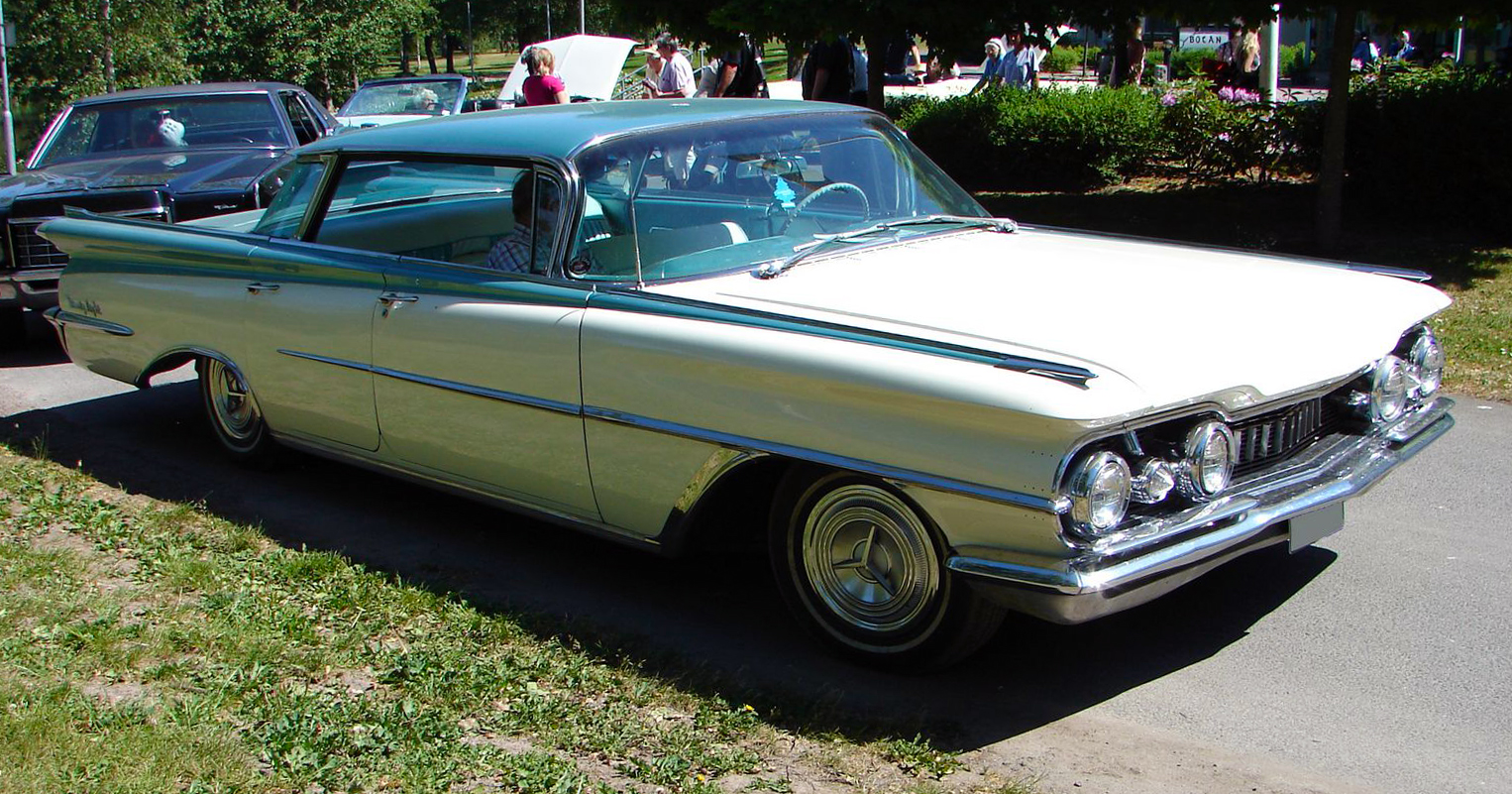 Oldsmobile 98 1959 at Skara Folkets park, Sweden